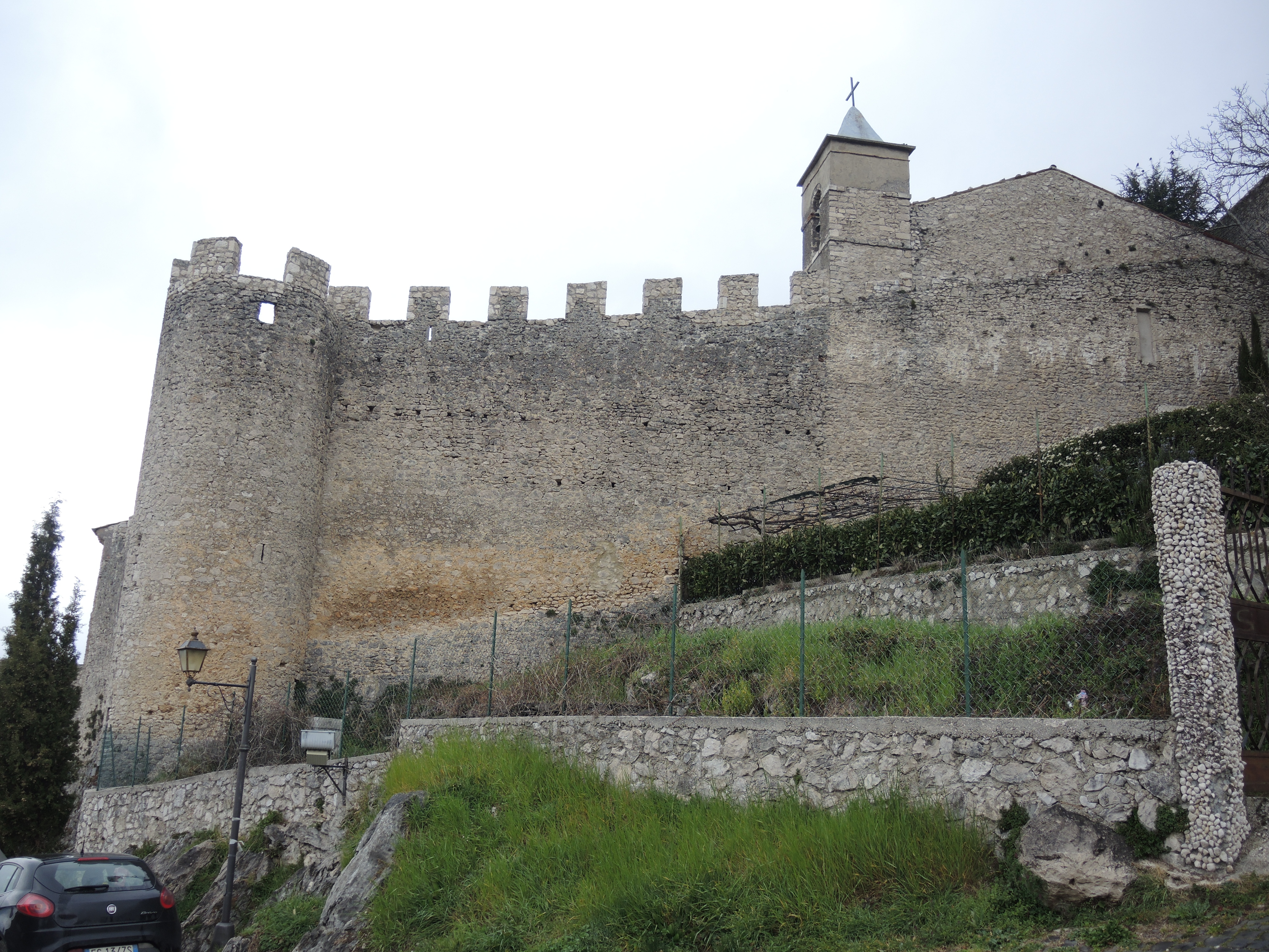 Pereto